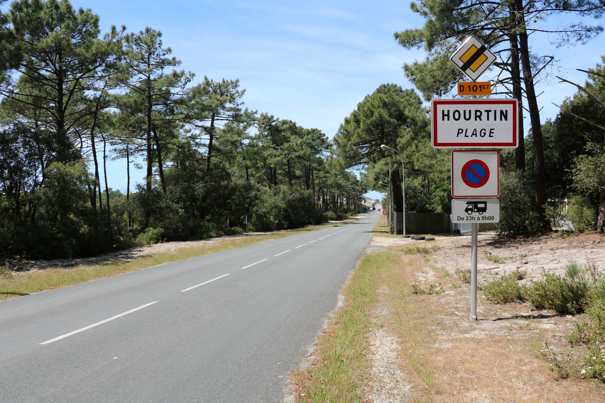 Hourtin-Plage au cœur de la forêt des Landes, sur la côte d'Argent